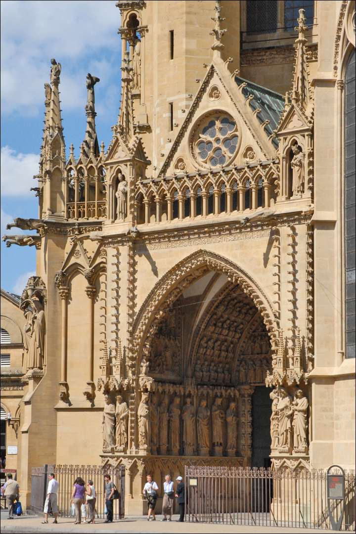 La cathédrale Saint-Étienne est l’église principale du diocèse de Metz en Moselle. Surnommée « lanterne du bon Dieu[1] », elle est la cathédrale de France ayant la plus grande surface vitrée — près de 6 500 m2 — et qui présente les plus grandes verrières gothiques d’Europe. Avec sa voûte suspendue à quarante-et-un mètres au-dessus du sol, la nef est la troisième plus haute de France. (extrait de Wikipedia)